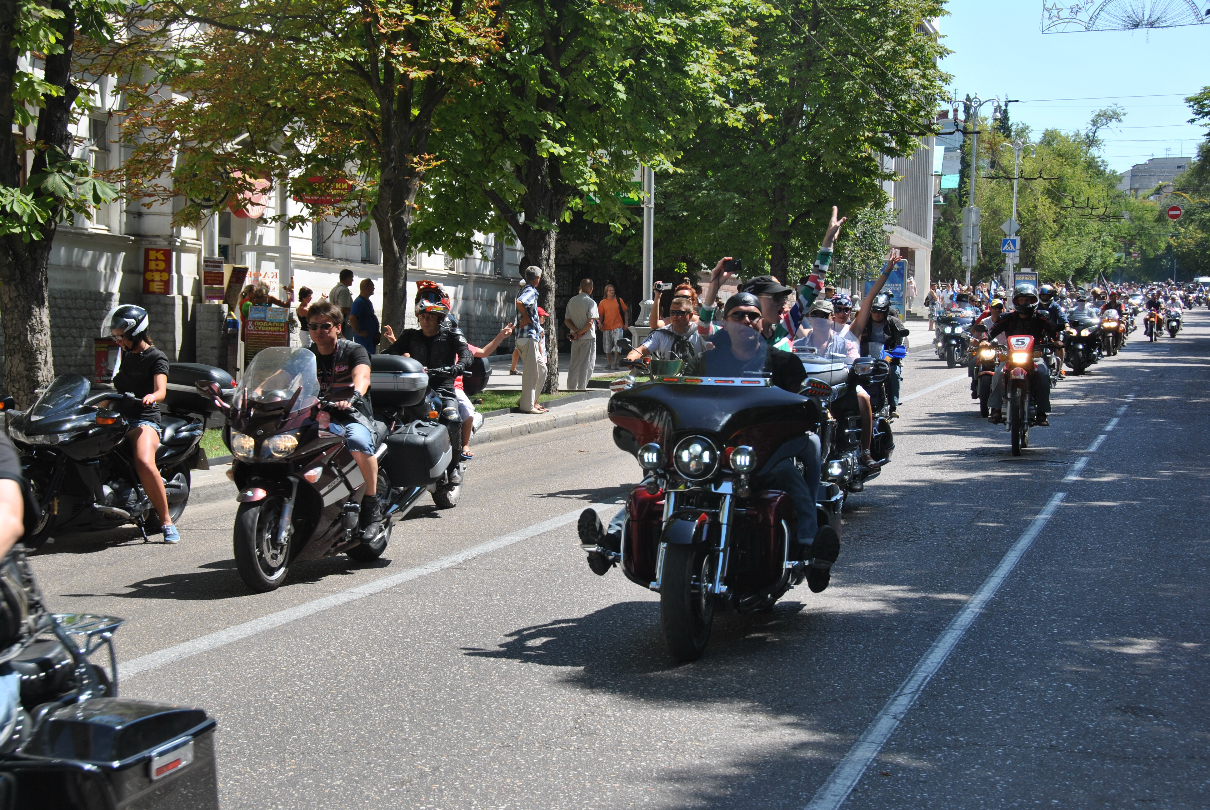 Различные клубы и фри-райдеры прибыли в июле 2012 года в Севастополь, Крым на Байк-шоу Ночных Волков.